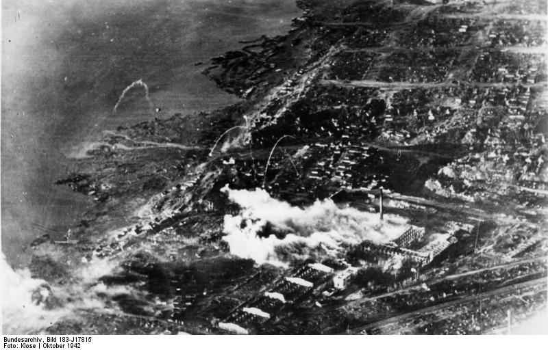 Russland, Kampf um Stalingrad, Luftangriff ADN-ZB II. Weltkrieg 1939-45 Schlacht um Stalingrad vom Juli 1942 bis Februar 1943 Luftaufnahme von Stalingrad nach einem Angriff durch Stukas der faschistischen deutschen Luftwaffe am 2. Oktober 1942 5853-42 [Sowjetunion.- Schlacht um Stalingrad.- Luftangriff]